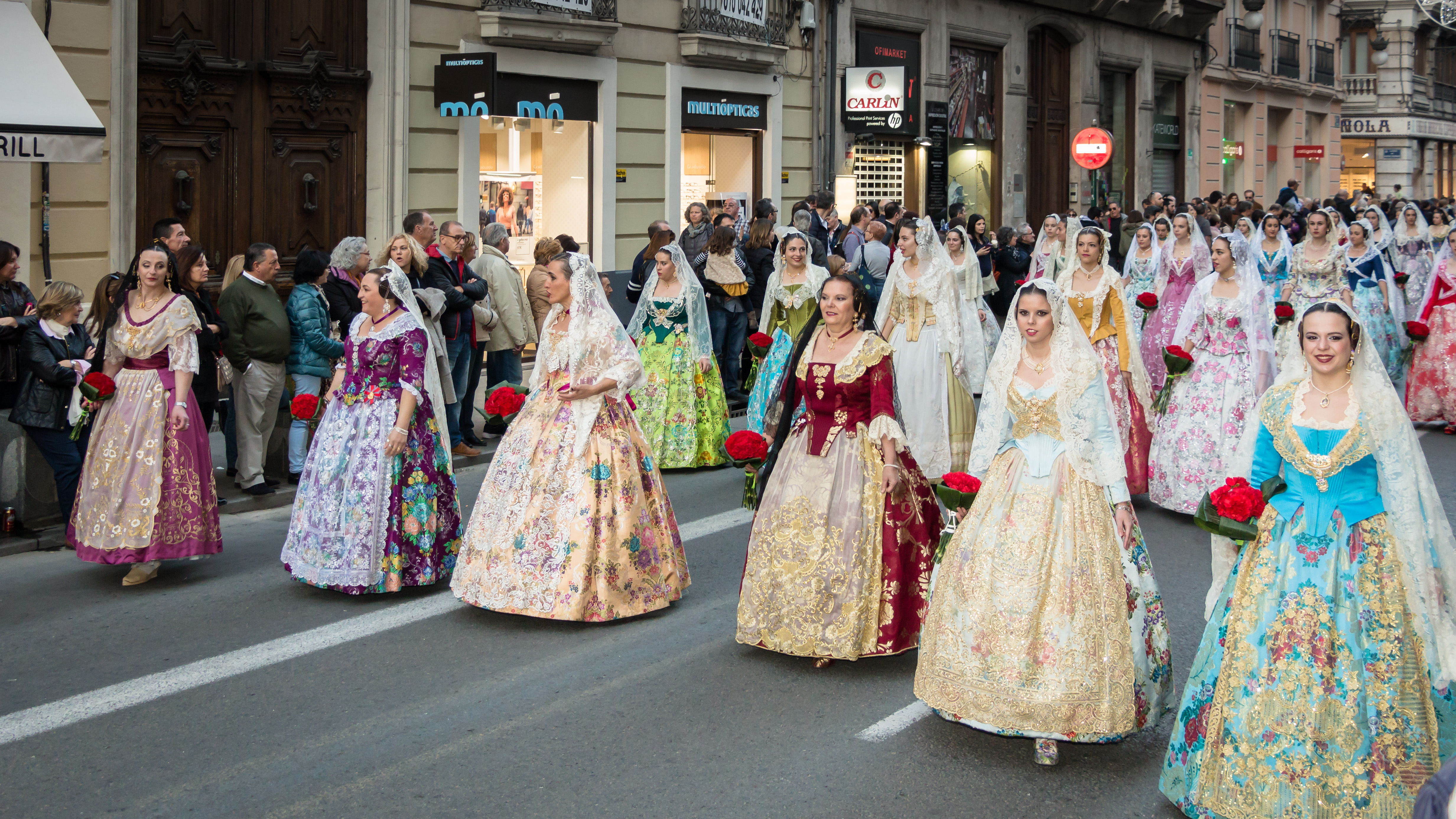 Retratos de falleras durante la Ofrenda de flores a la Virgen de los Desamparados This is a photography of a Folklore festival in Spain (Wikidata id Q1143768).